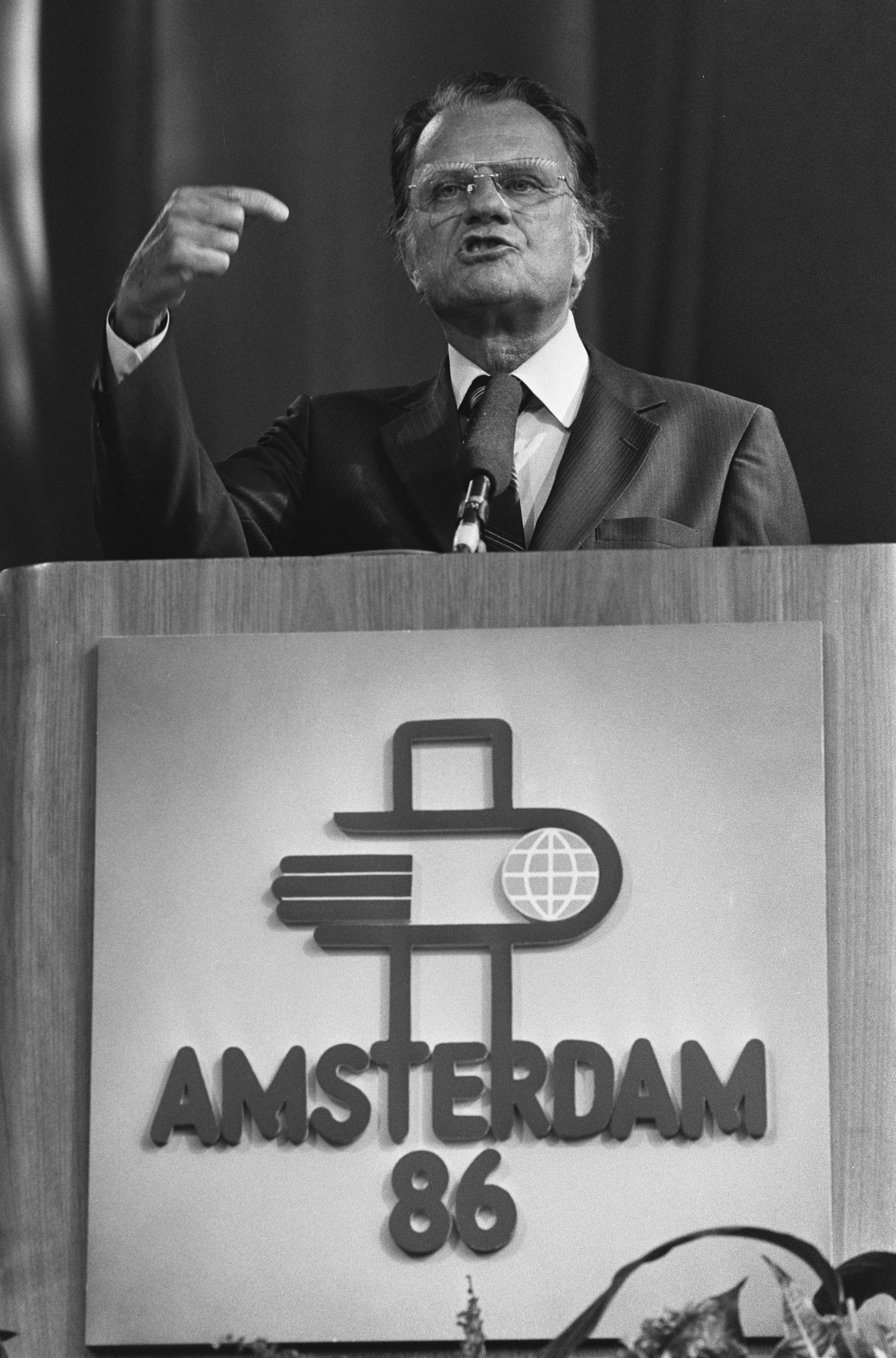 Collectie / Archief : Fotocollectie Anefo Reportage / Serie : [ onbekend ] Beschrijving : Billy Graham Datum : 17 juli 1986 Persoonsnaam : Billy Graham Fotograaf : Gerrits, Roland / Anefo Auteursrechthebbende : Nationaal Archief Materiaalsoort : Negatief (zwart/wit) Nummer archiefinventaris : bekijk toegang 2.24.01.05 Bestanddeelnummer : 933-7130